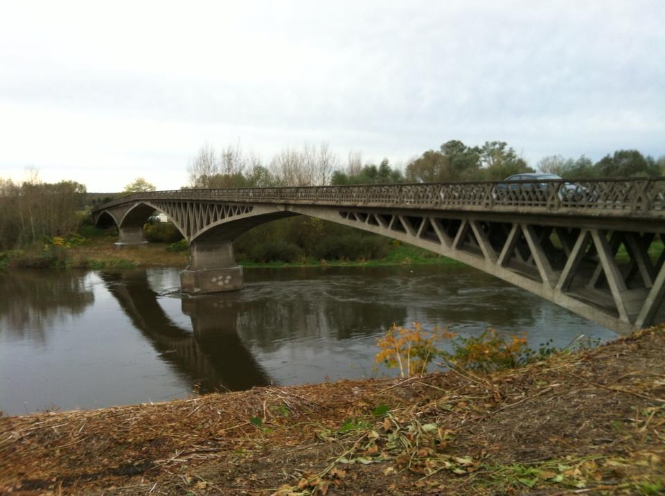 Pont Boutiron